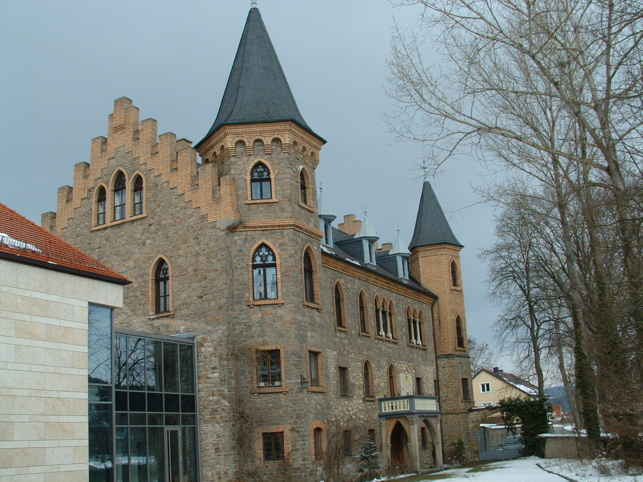 Außenansicht des ehemaligen Schlosses Spindlhof